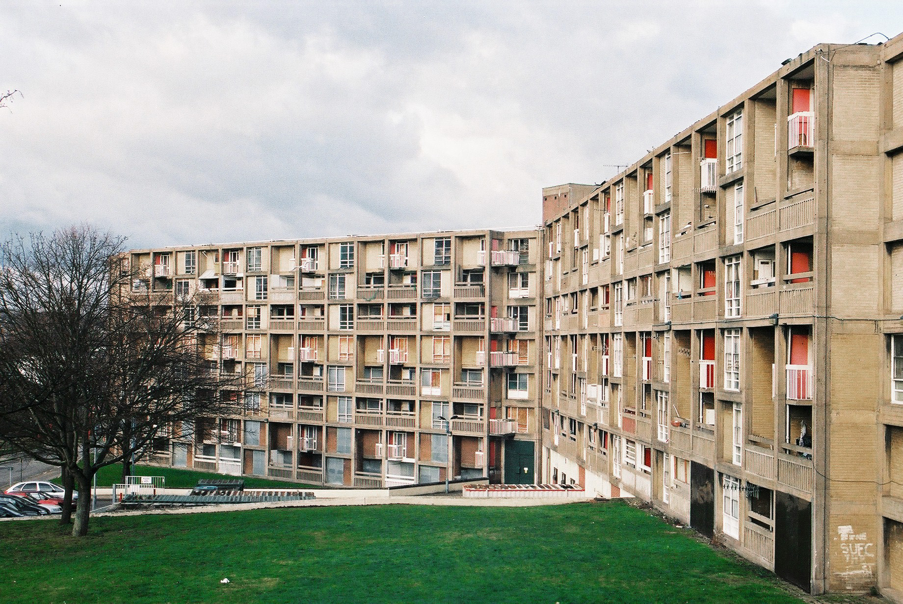 Fuente: Archivo personal Julián Varas